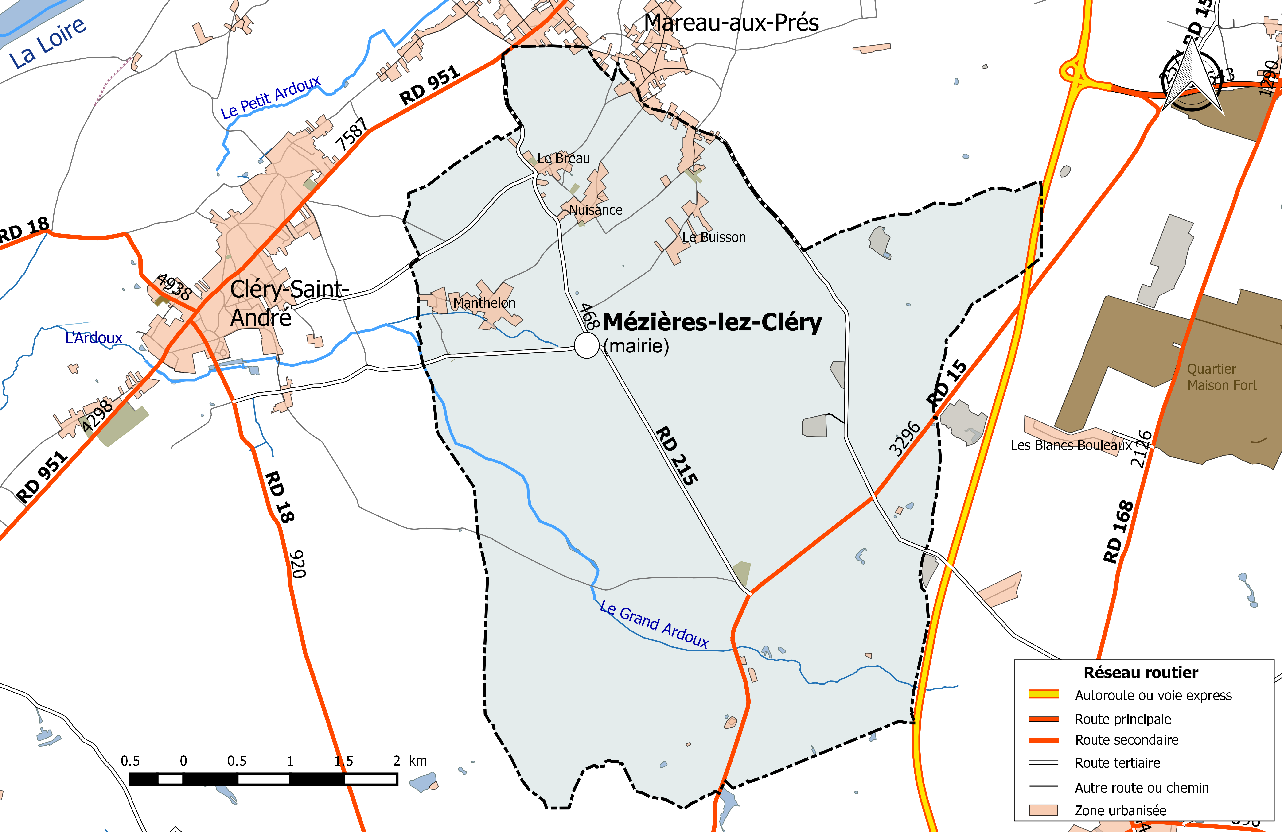 Carte du réseau routier de la commune de Mézières-lez-Cléry.